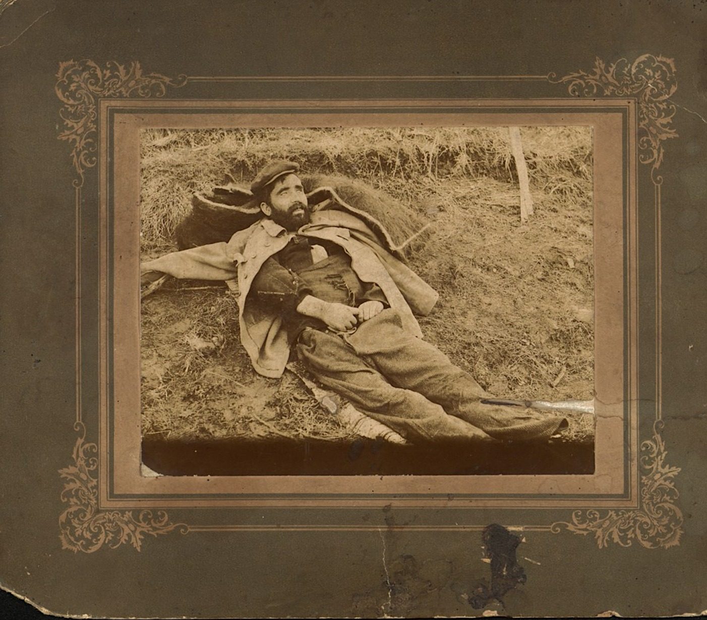 Убитият Гоце Думчев (? - 1906)